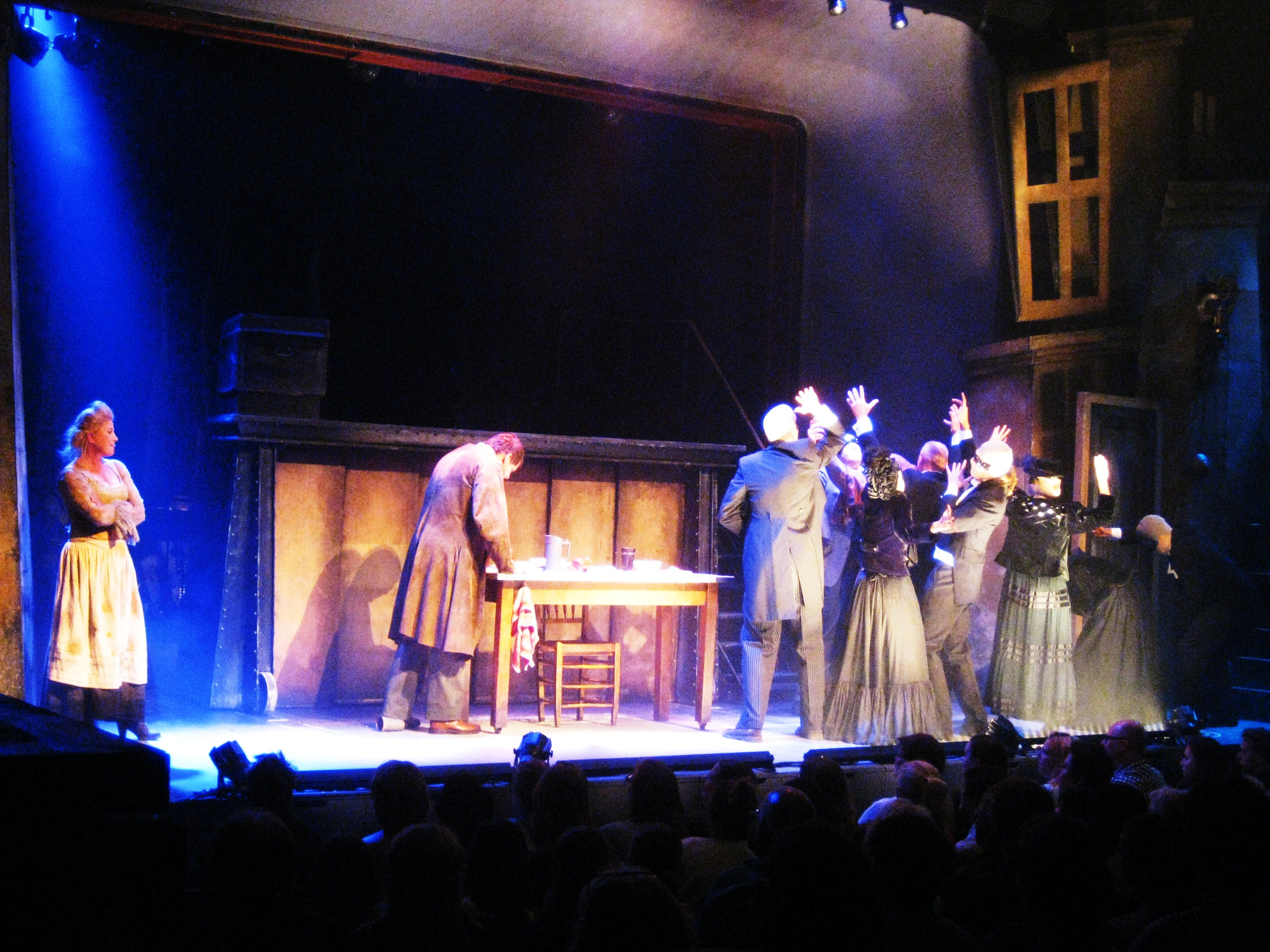 Scène uit de musical Sweeney Todd in mei 2016 in het Zonnehuis in Amsterdam Noord. Met Vera Mann en René van Kooten